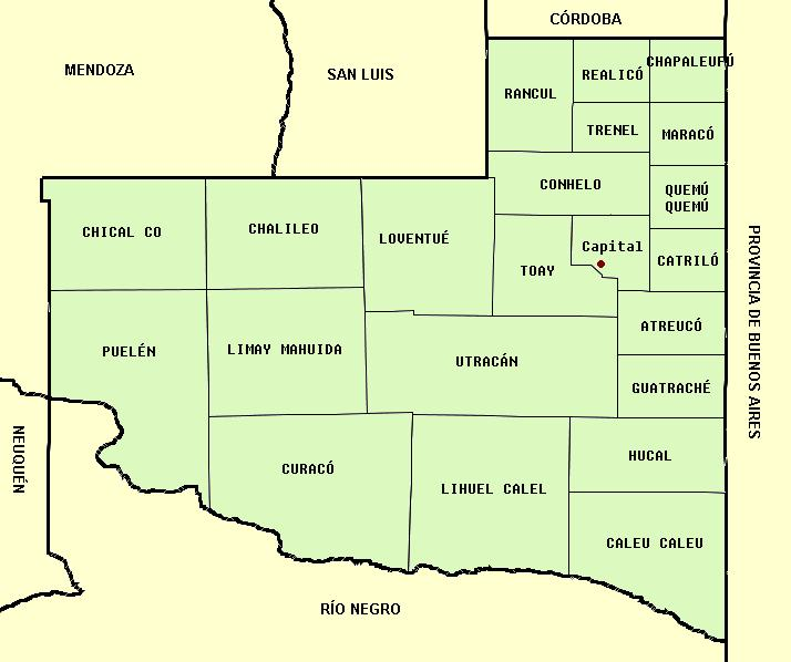 Nombres de los departamentos de la Provincia de La Pampa.